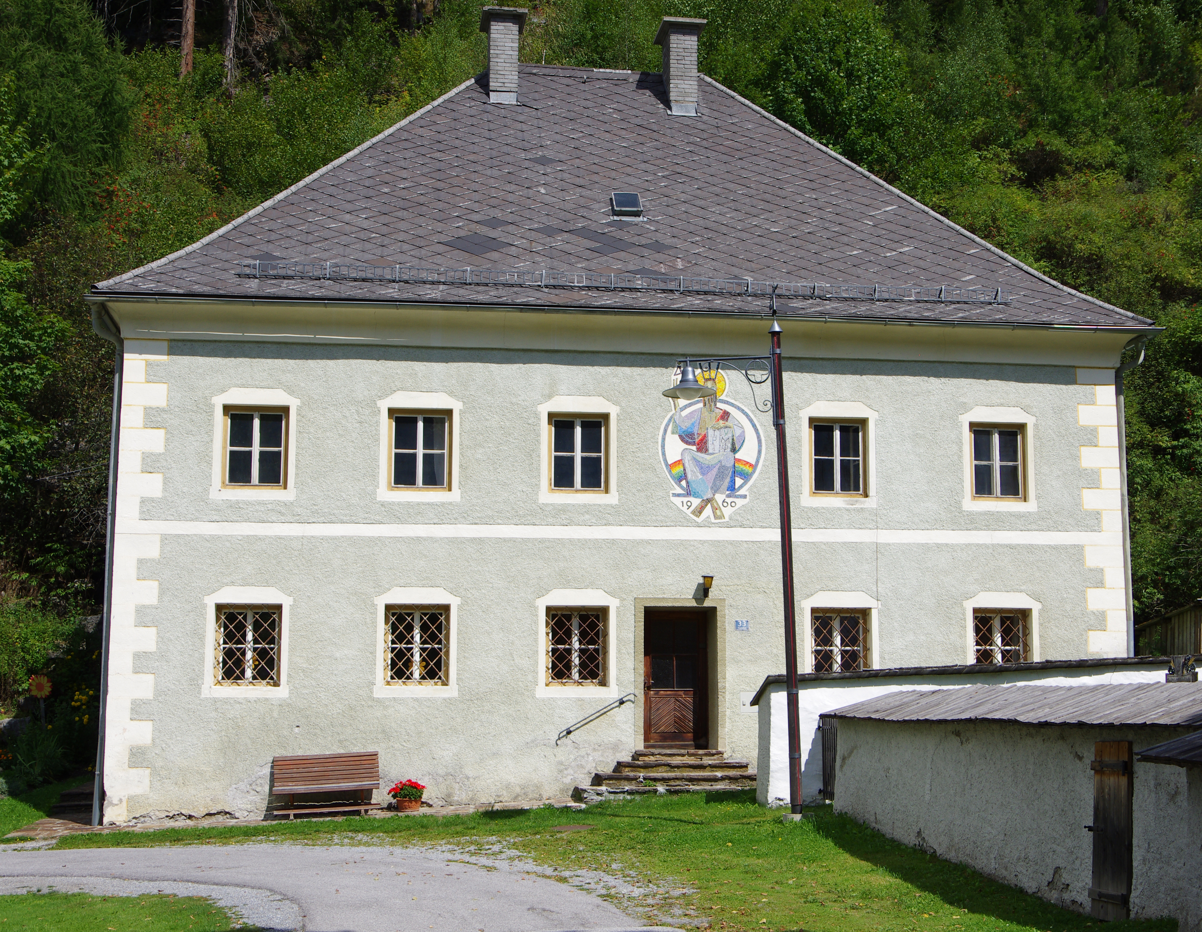 Pfarrhof